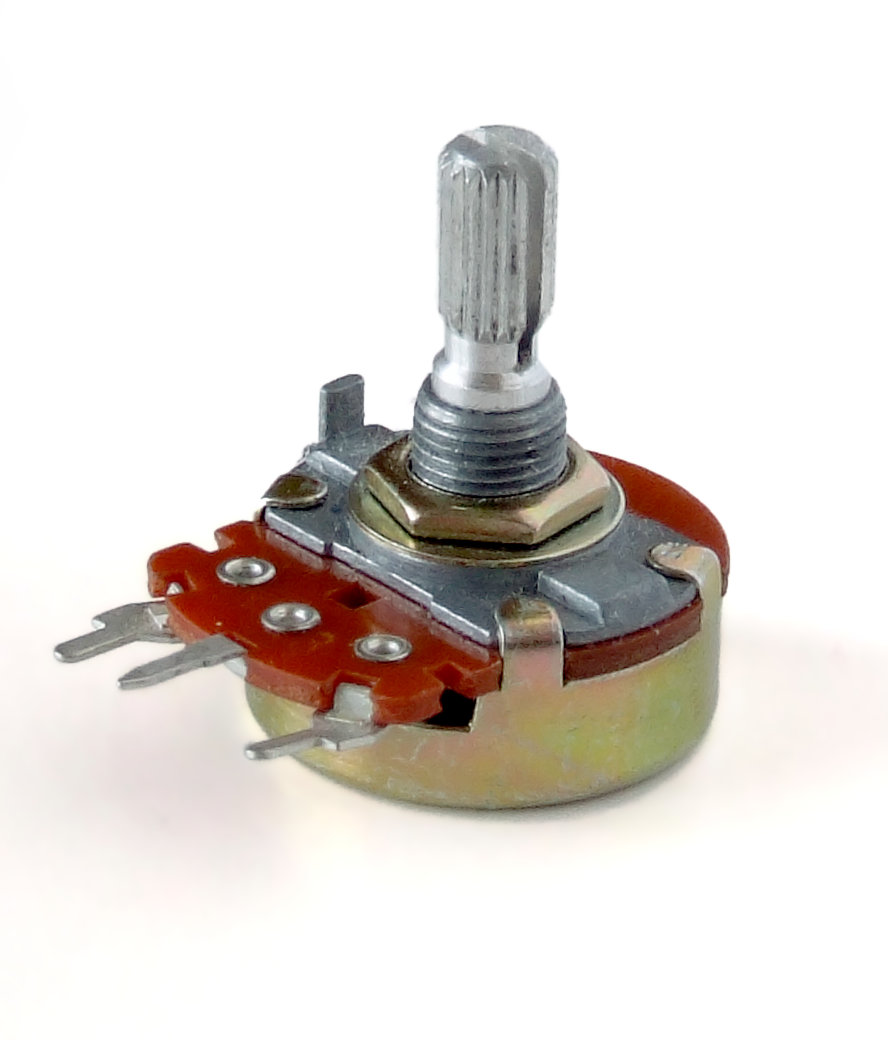 A potentiometer